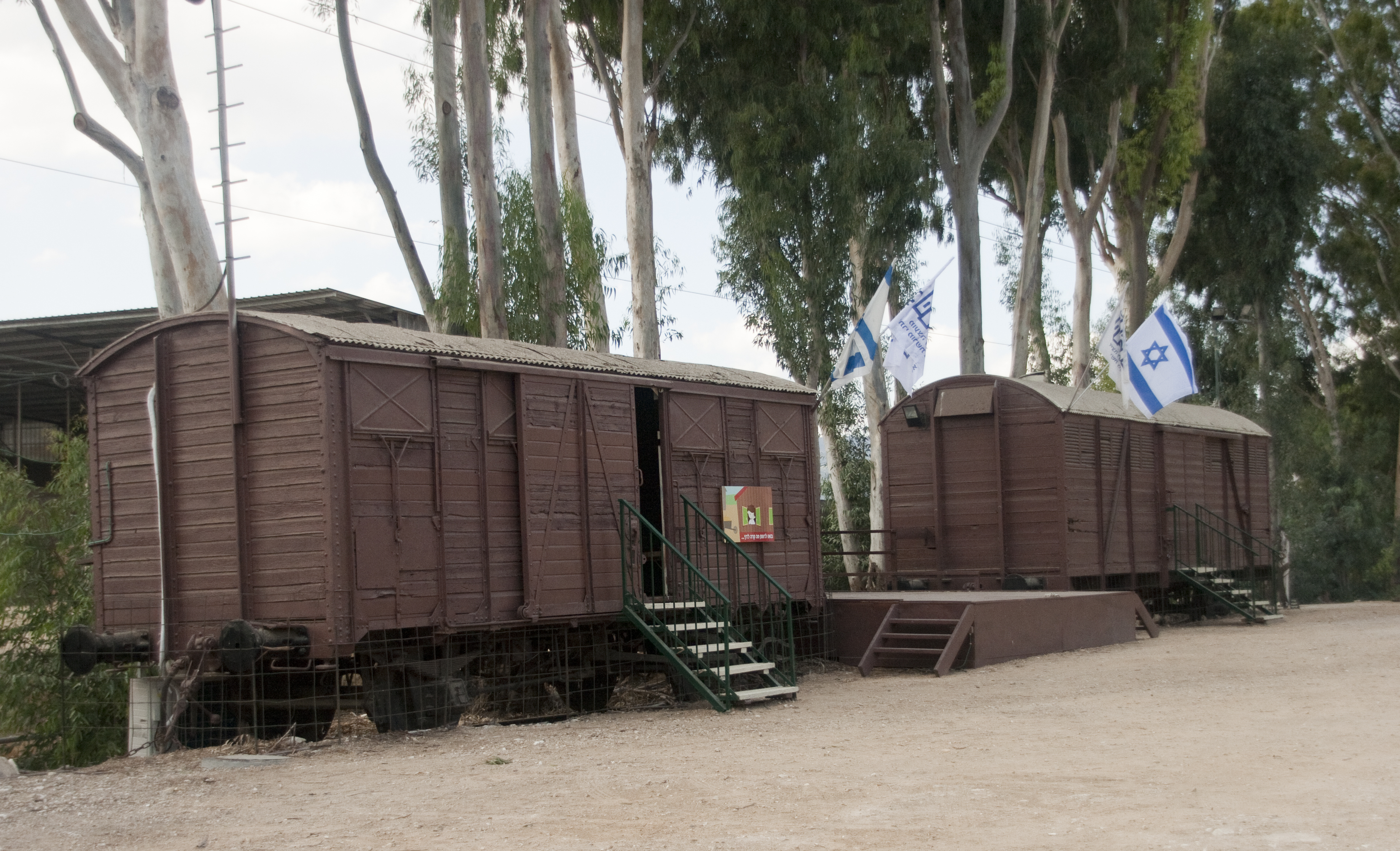 תחנת רכבת העמק בכפר יהושע - קרונות לדוגמא